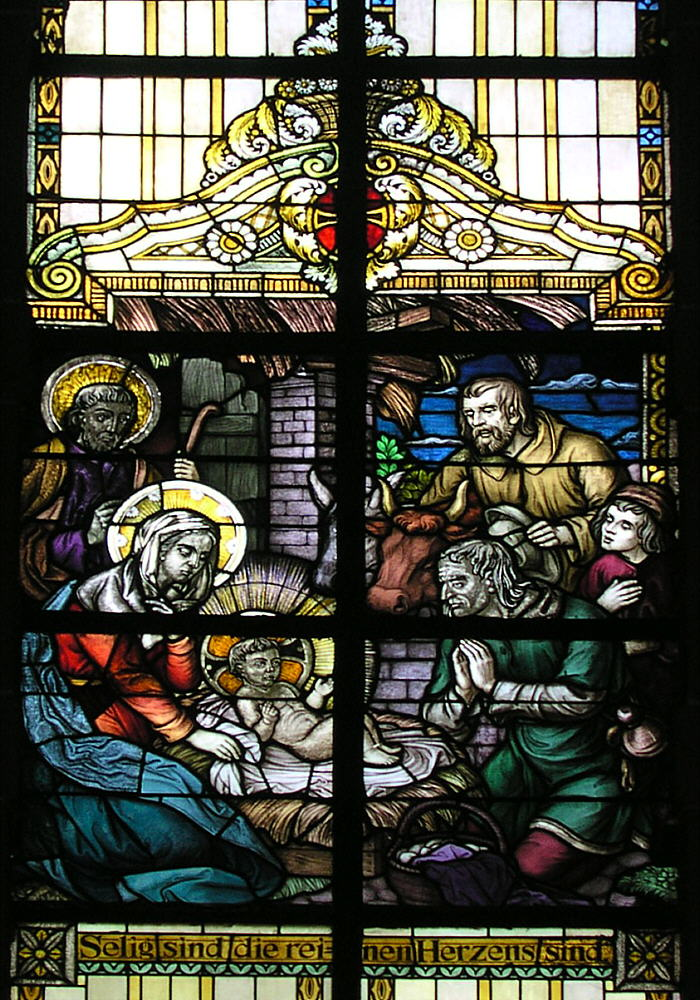 Trittenheim an der Mosel, Bleiglasfenster im Nazarenerstil (1923) in der katholischen Pfarrkirche "St. Clemens" Matthäus 5,8 Selig, die ein reines Herz haben; denn sie werden Gott schauen. Aus den Jahren 1920/21 stammen die größtenteils noch originalen neoromanisch gehaltenen Glasfenster der Firmen Gassen & Blaschke (Düsseldorf; 1., 2., 4. und 6. Seligpreisung).